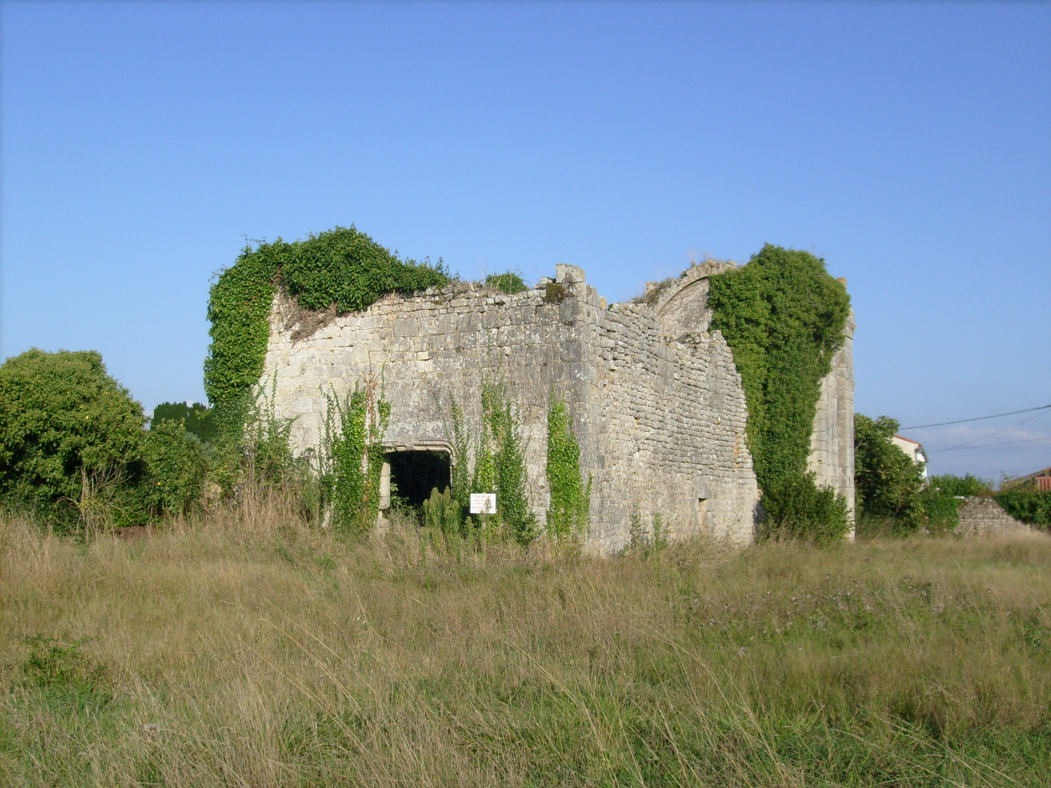 Les ruines de l'église Notre-Dame de Montherault